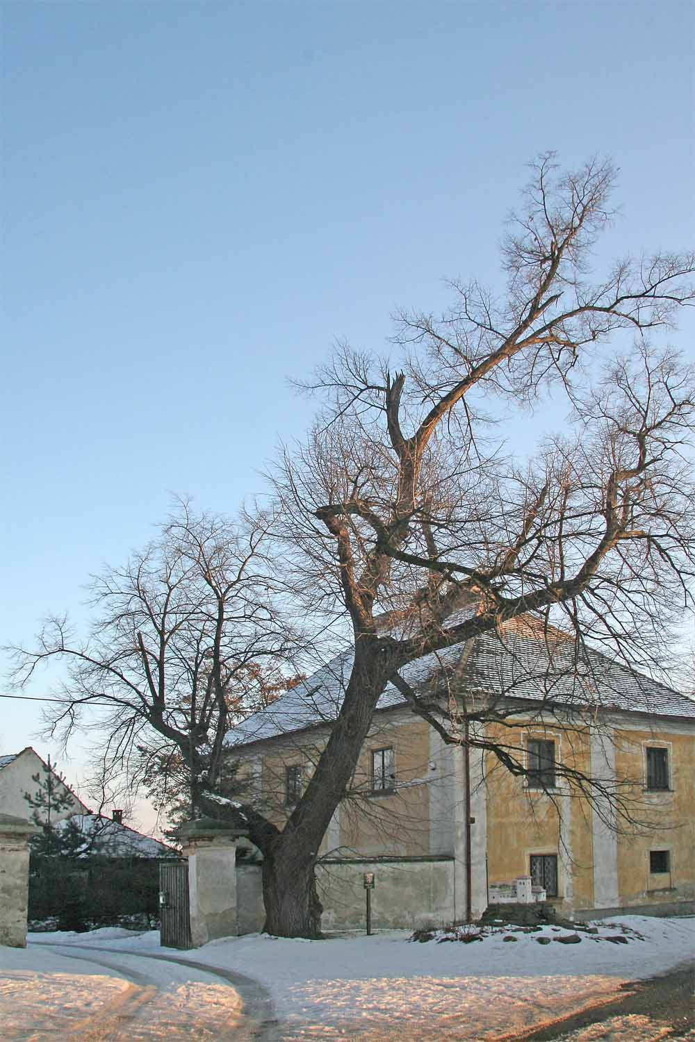 Památní lípa malolistá v Týnci nad Labem